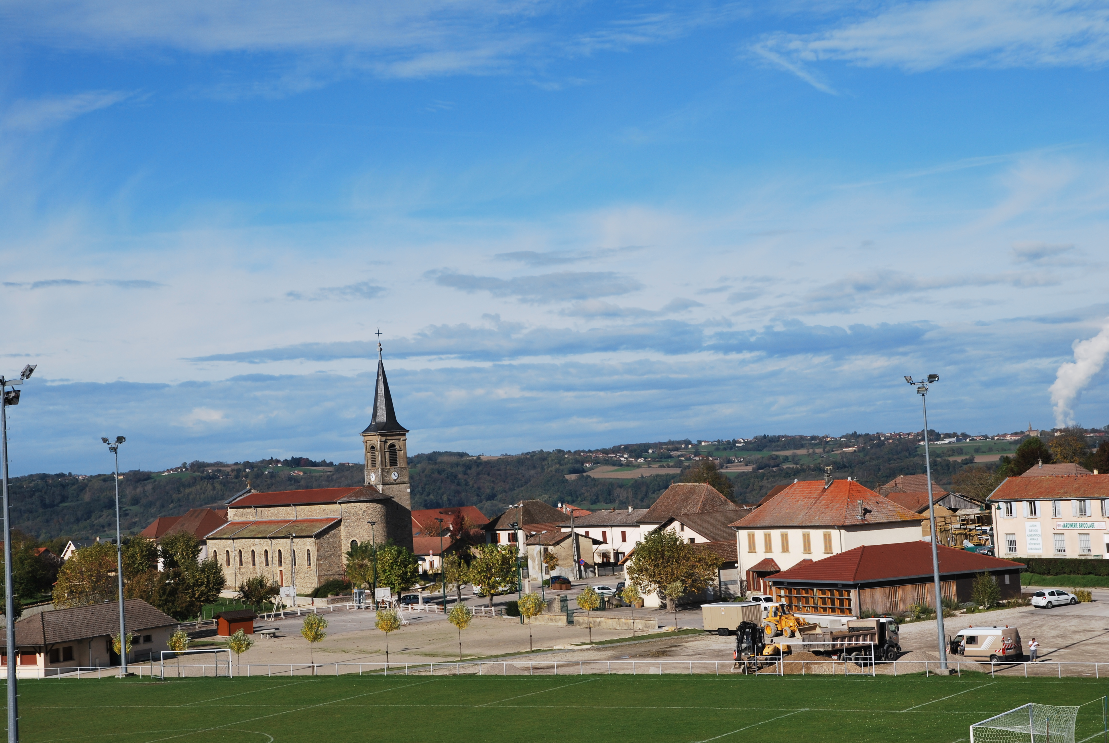 Centre village